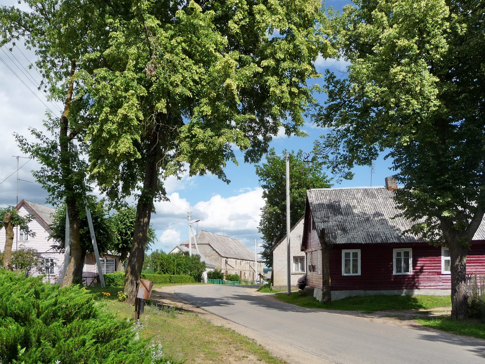 Kriūkai, Nemuno gatvė